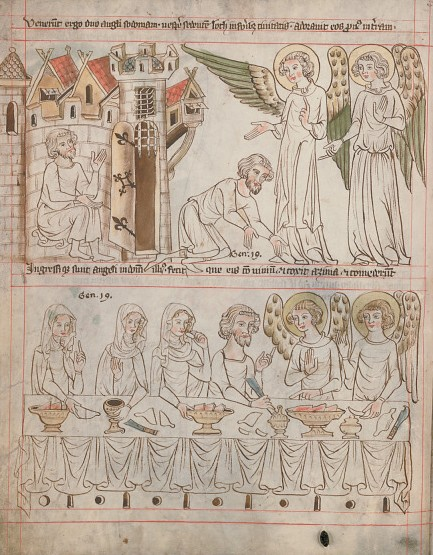 Hospodinovi poslové přicházejí do Sodomy